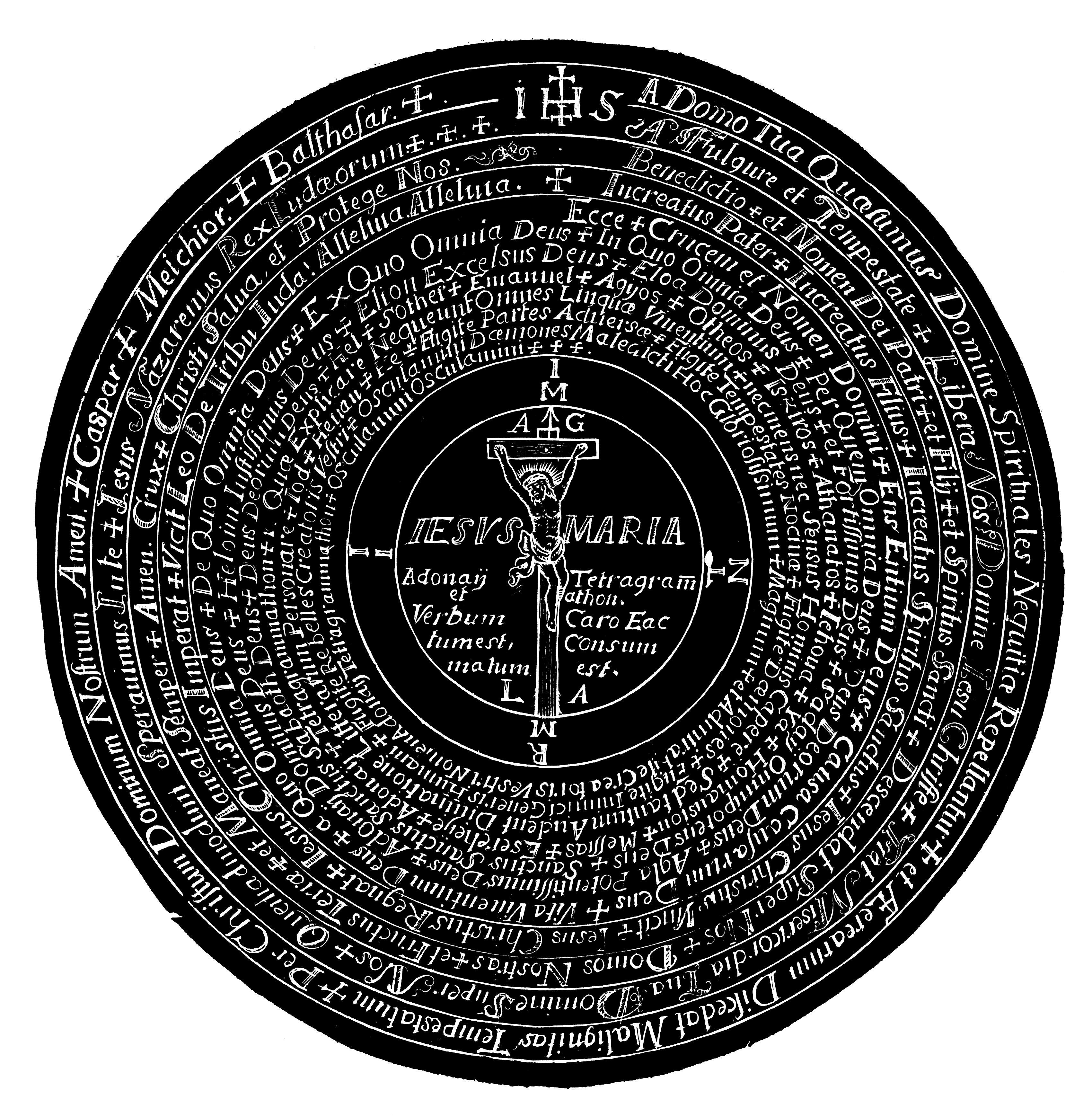 Rückseite eines Wettersegens, Heimatmuseum Tittmoning